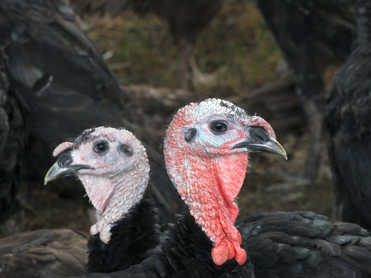 Köpfe von zwei Truthähnen